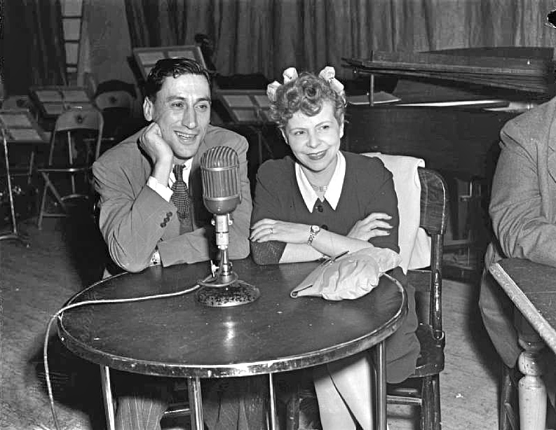 Roger Baulu et Jovette Bernier, assis à une table devant un micro sur la scène d'une salle de spectacle lors de l'enregistrement par C.B.C. (Radio-Canada) du jeu questionnaire «Le Mot S.V.P.» (Note : En date d'avril 2014, une notice de BAnQ identifie la personne à côté de Roger Baulu comme étant Jovette Bernier [1] et une autre notice de BAnQ identifie la même personne sur la même photo comme étant Nicole Germain [2]. Nous retenons ici l'identification de Jovette Bernier, qui semble la plus plausible. La notice qui mentionne Nicole Germain semble être une erreur.)